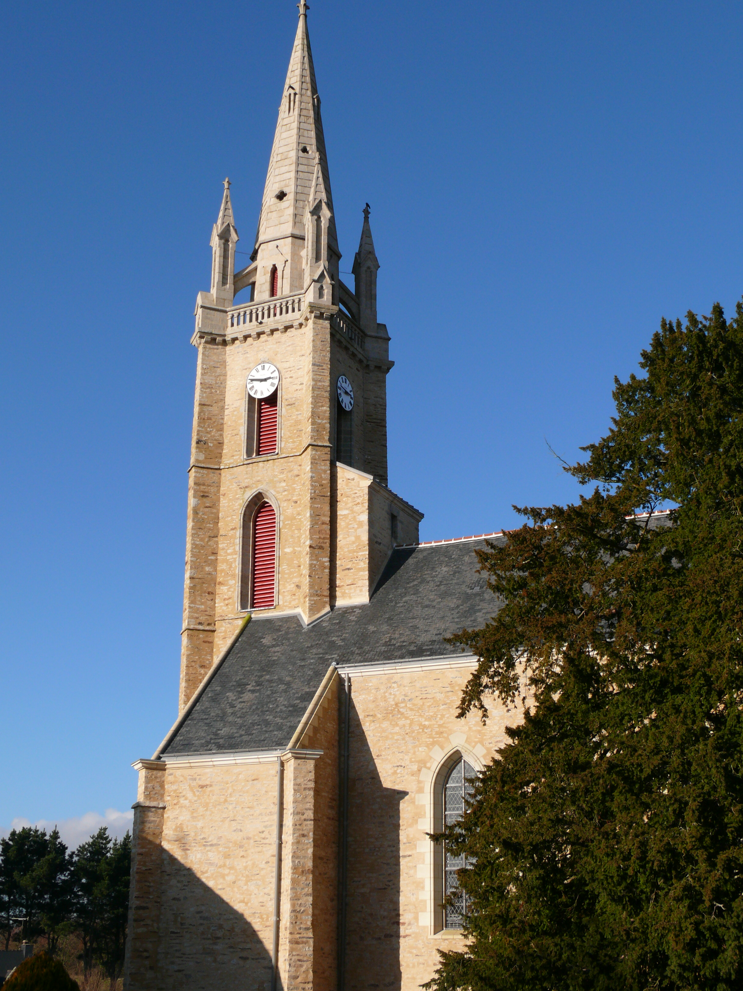 L'Eglise de La Chapelle-Caro